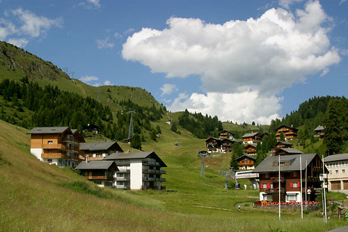 Östlicher Teil der Riederalp (Talstation der Moosfluh-Bahn), Schweiz